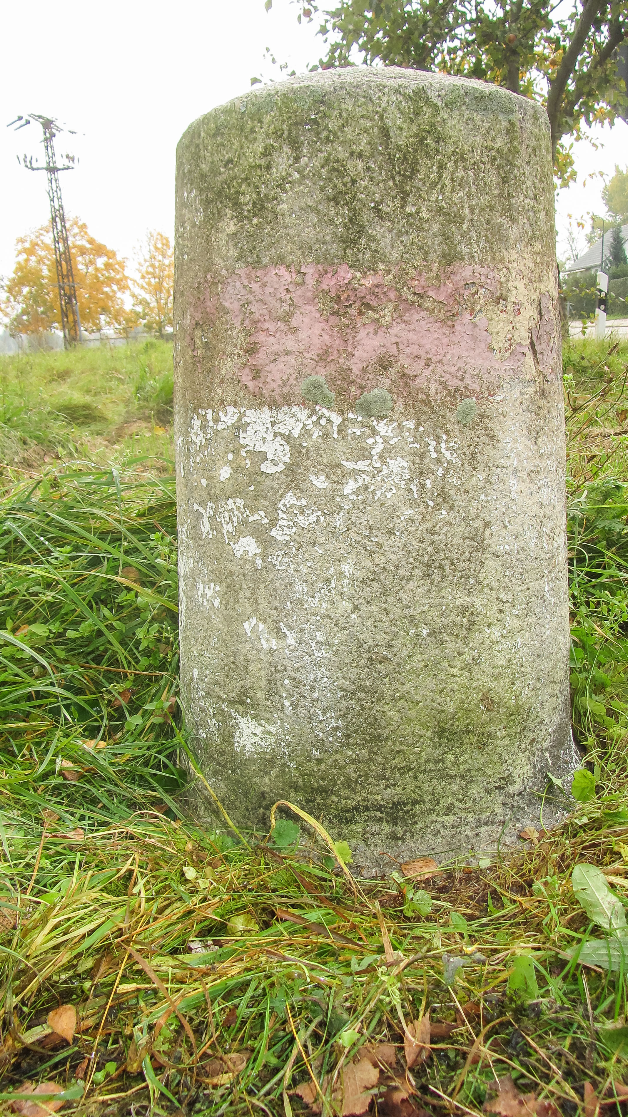 Preußischer Rundsockelstein (1422) in Lindtorf, an der K 1062, Einmündung K 1042